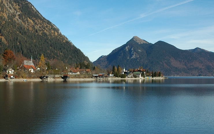 Die Ortschaft Walchensee